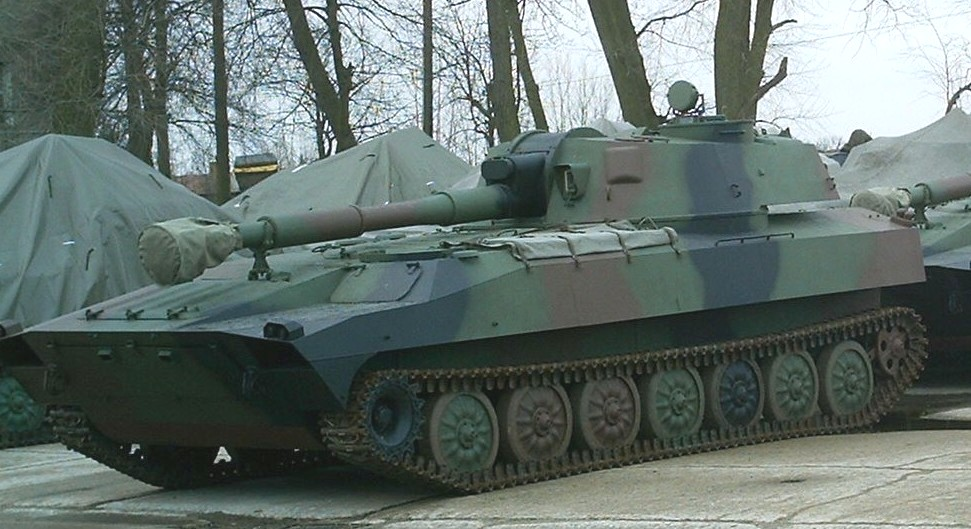 Polska samobieżna haubica 2S1 Goździk produkcji HSW.